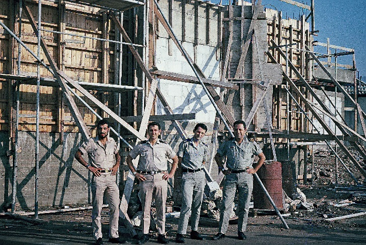 הצוות הראשון של מתקן האימון הטקטי על רקע בנינו העומד בבנייתו, נובמבר 1969